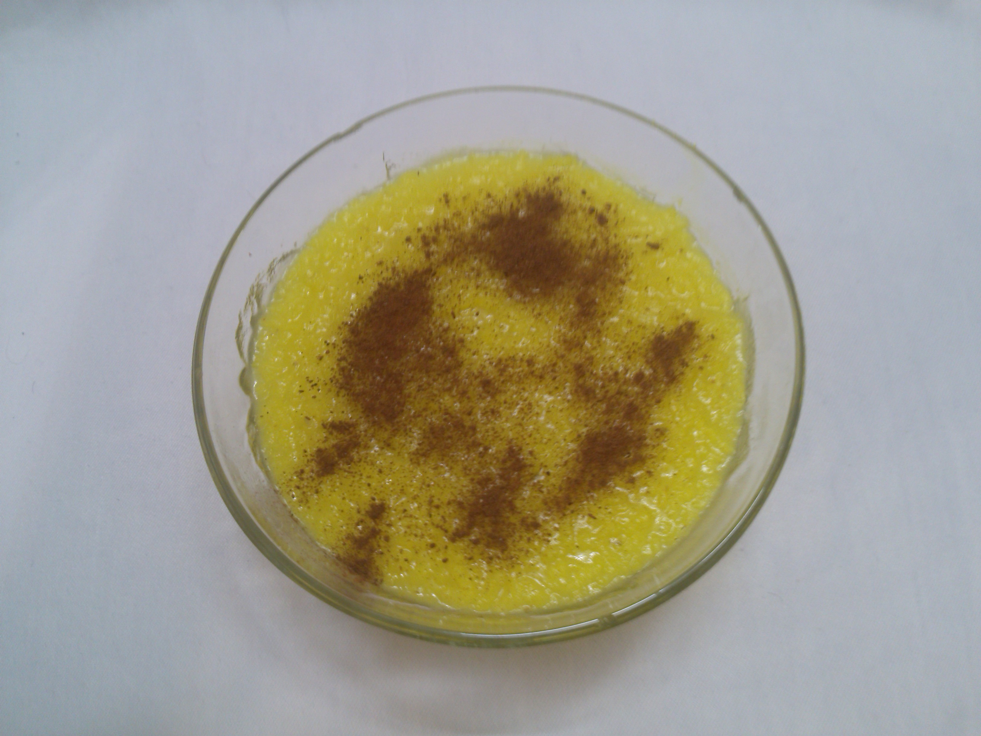 آش شله زرد